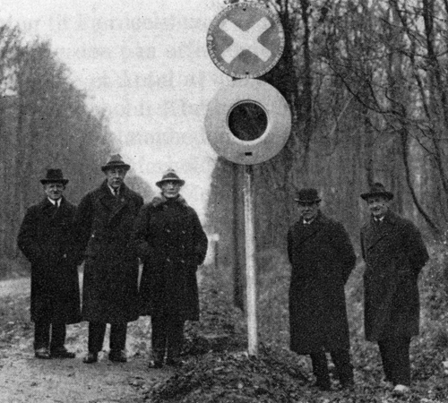 Kongelig Dansk Automobilklubs og Forenede Danske Motorejeres fælles vejtavleudvalg ved et af Knud V. Engelhardts skilte. Fra venstre: Hr. Dahl (KDAK), Andreas Hansen (KDAK), Konsul Ludvigsen (KDAK), Ingeniør Ussing (KDAK?) og Kaptajn Ibsen (KDAK)